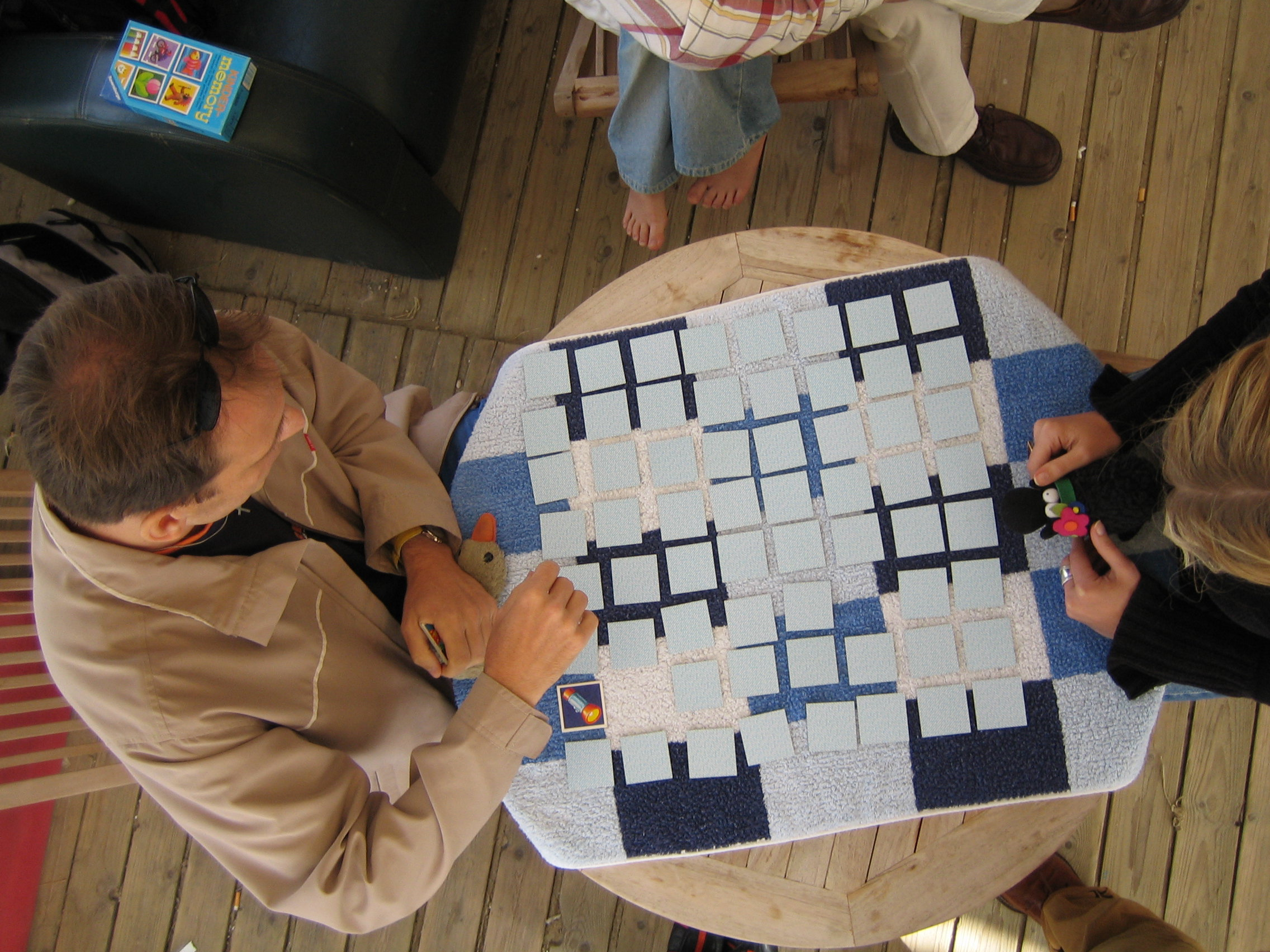 Foto van de finale van het Beach Memory Tournooi 2005 te Scheveningen in de klasse voormalige winnaars.